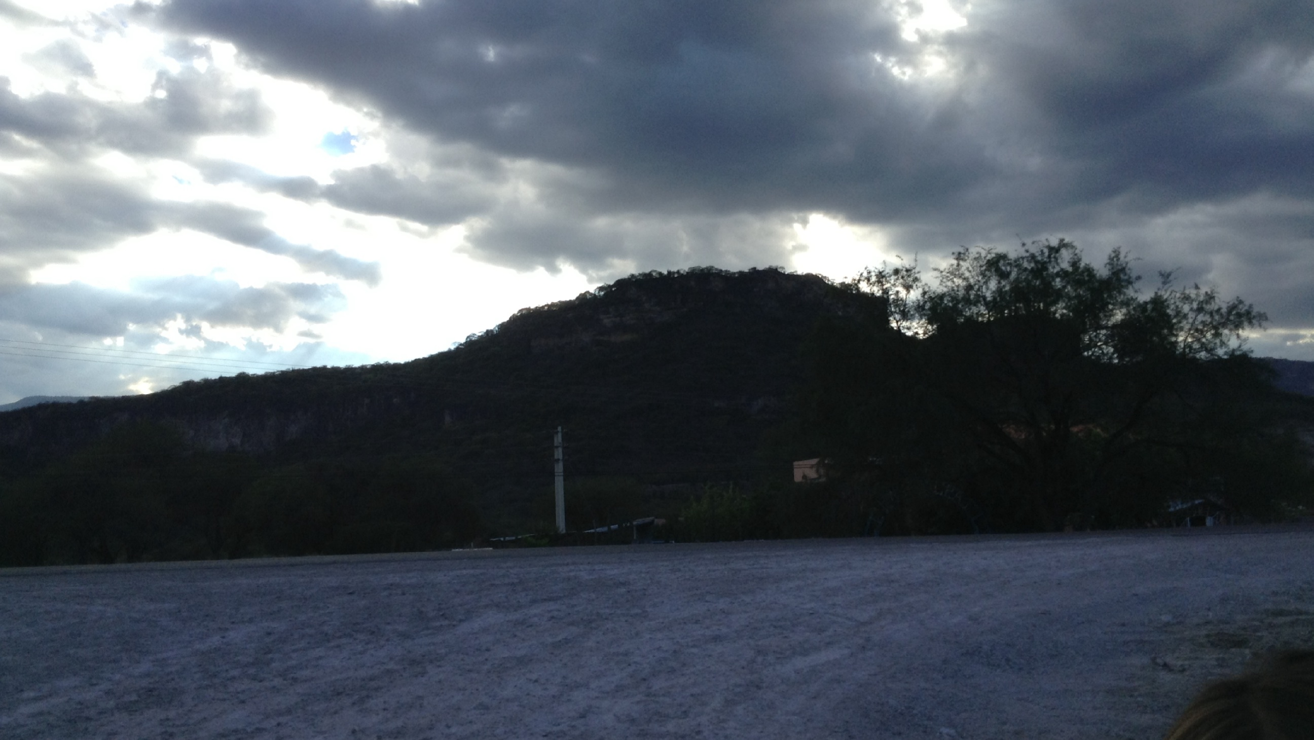 El Cerro de Las Ventanas. Un sitio arqueologico de Zacatecas